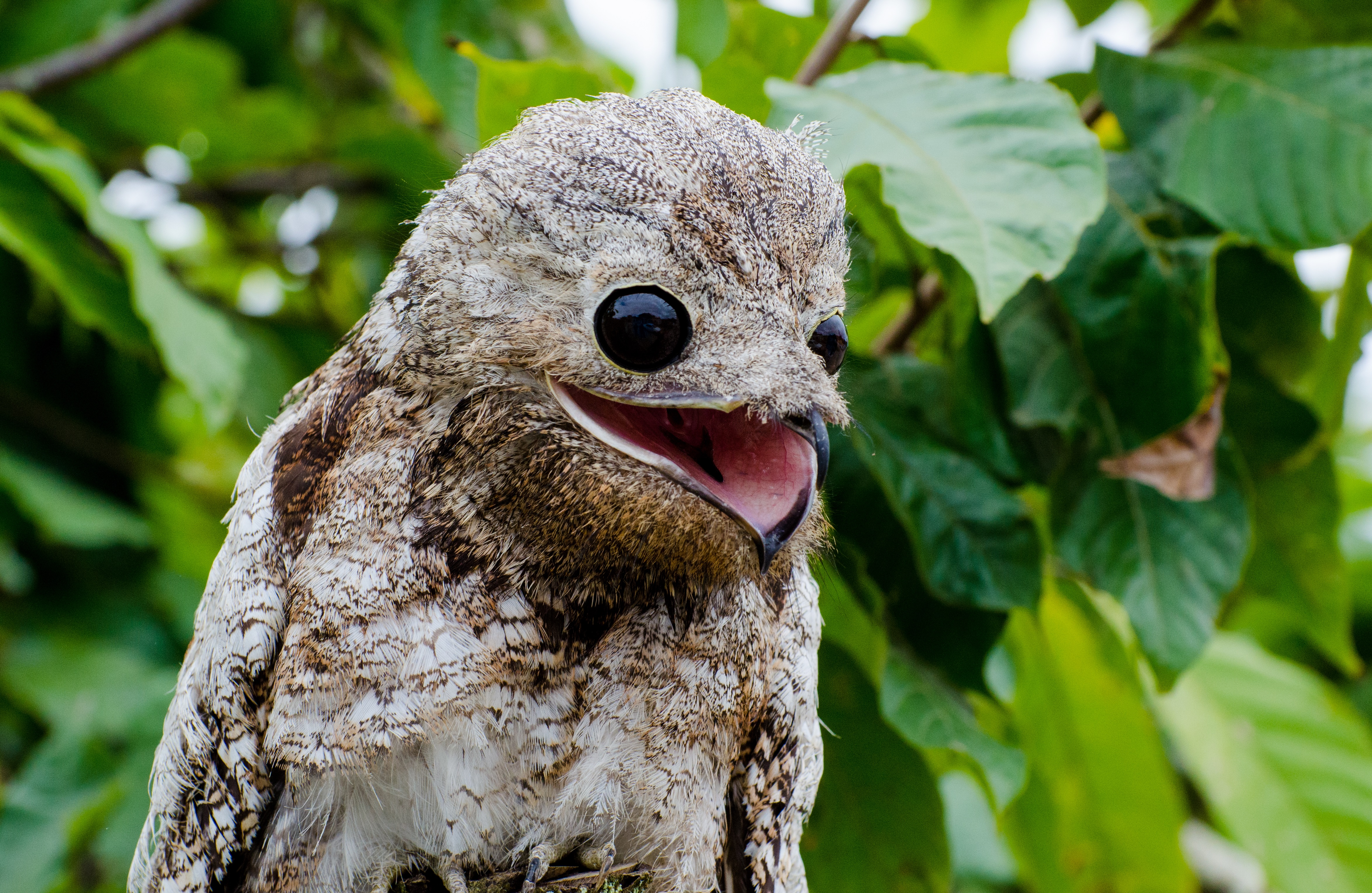 É a maior espécie da família. Possui entre 45 e 57 centímetros de comprimento e pesa entre 360 e 620 gramas (Cohn-Haft, 2012). Sua envergadura atinge 1 metro. Apresenta uma boca descomunal e difere de outras espécies da mesma família por sua plumagem esbranquiçada. Segundo Wetmore (1968), apresenta duas fases de coloração, a fase cinza e a fase marrom. O adulto apresenta coloração acinzentada, com manchas e estrias de coloração parda, branca e marrom em vários tons. São ligeiramente barrados, e salpicado de cinza e marrom acinzentado. As coberteiras da asa apresentam coloração cinza escurecido forrada com marrom. As primárias e secundárias são pretas, barrado indistintamente com cinza fosco, com as bordas exteriores marcados fortemente com branco ou branco acinzentado. A cauda tem bordas pretas bem definidas e é fortemente barrada. A garganta e o pescoço são pálidos, variando de coloração bege pálido a canela pálido, com fino barrado e pontos escuros. Peito e flancos do peito com manchas e estrias nas cores marrons, pardas, amarelo, branco, marrom escuro e preto fosco. O ventre é esbranquiçado. As penas infracaudais são de coloração branca, com algumas barras de cor marrom acinzentada. A íris é castanha escura ou alaranjada, o bico é marrom, apresentando-se mais pálido na porção proximal da comissura e mais escuro na ponta distal, os tarsos e pés são amarelos. Os juvenis da espécie apresentam a plumagem semelhante ao adulto, entretanto são mais pálidos na cabeça, costas peito e flancos com barrado e manchas de cores mais escuras muito reduzidas. Sua vocalização bizarra muitas vezes é fonte de lendas e temores por parte da população rural. Provavelmente é dessa espécie o “rugido” noturno que os moradores da zona da mata mineira atribuem ao personagem folclórico conhecido como caboclo d`água.